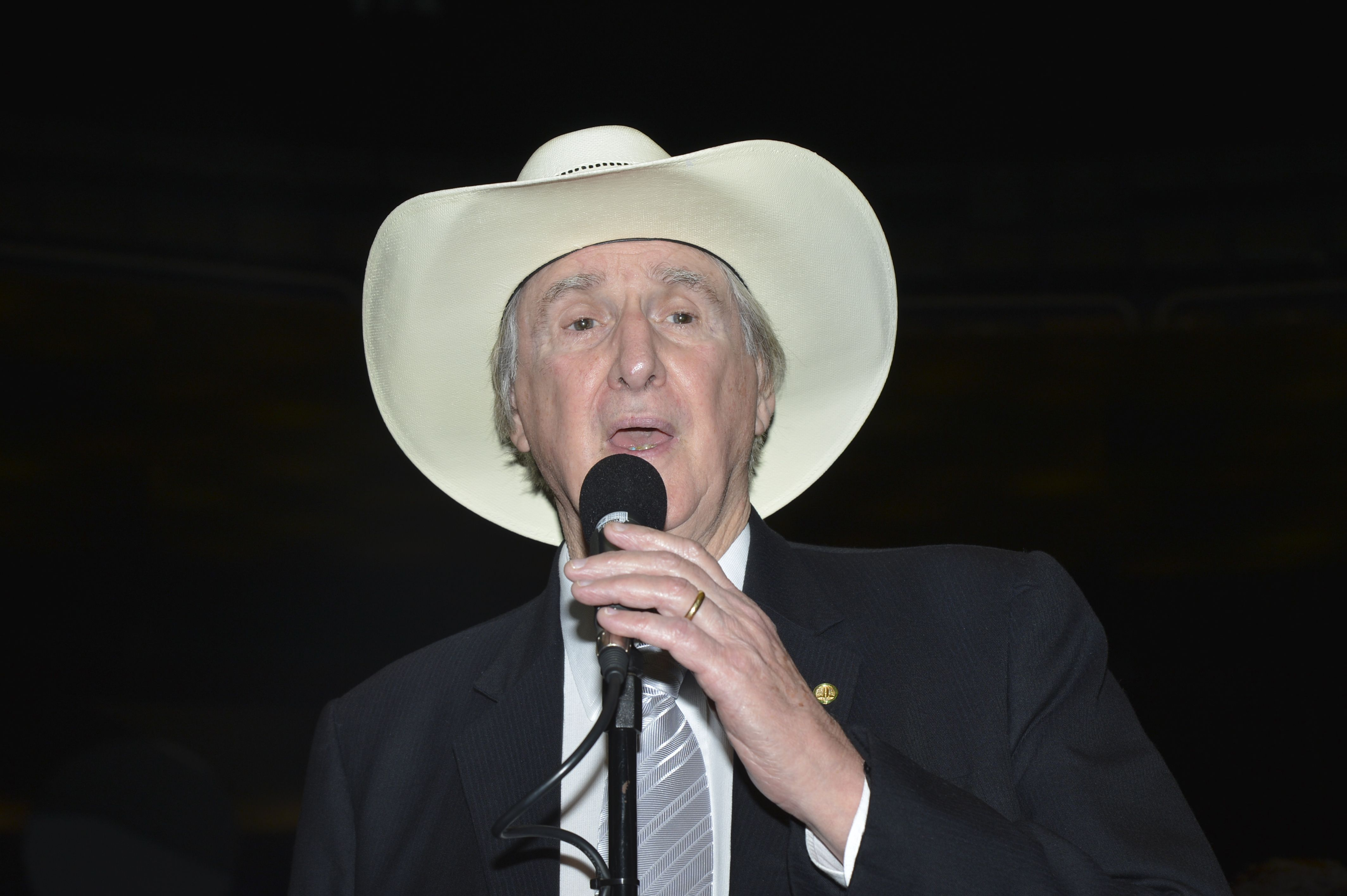 O deputado e cantor, Sérgio Reis canta no Plenário da Câmara dos Deputados durante sessão solene em homenagem ao Dia Mundial da Voz.